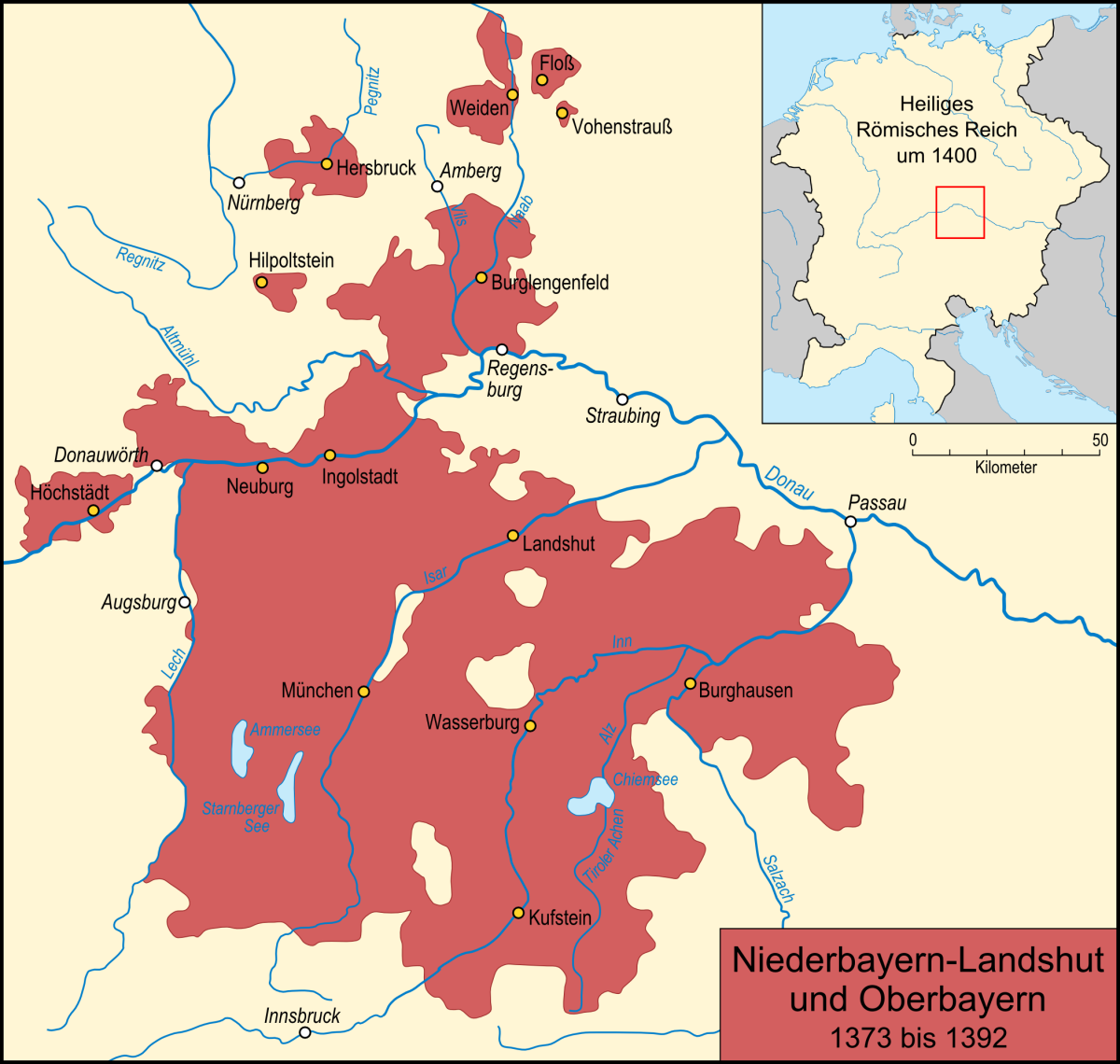 Karte des Herzogtums Niederbayern-Landshut und Oberbayern in seiner Ausdehnung von 1373 bis 1392